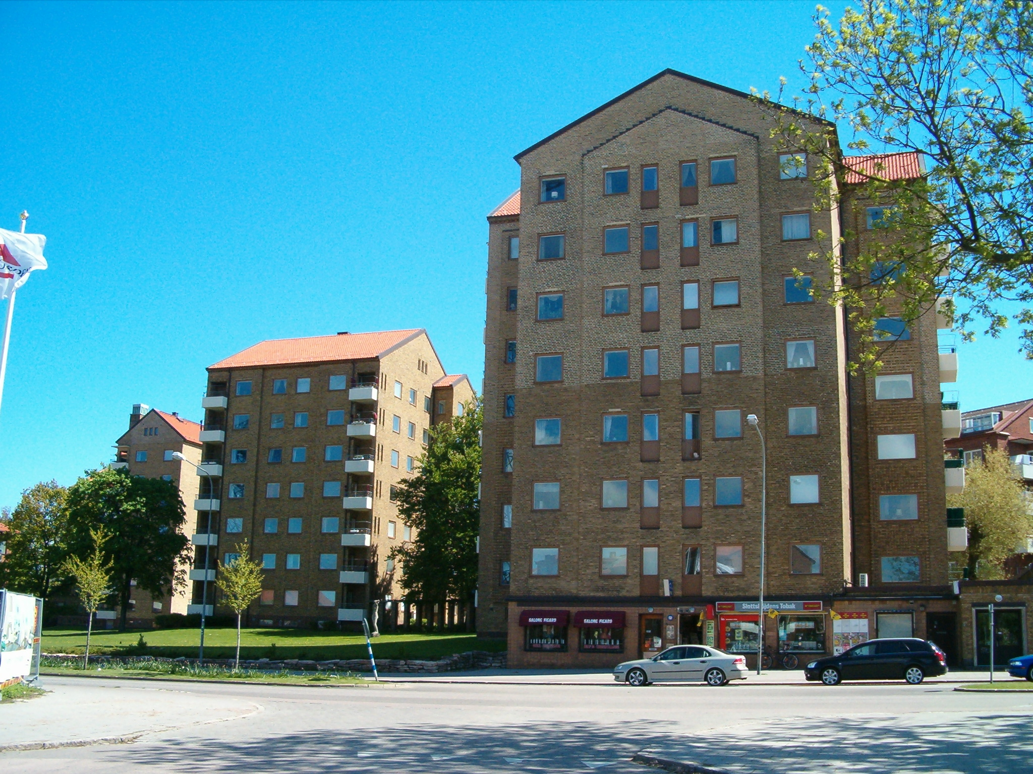 Houses on Slottshöjden in Helsingborg, Sweden.